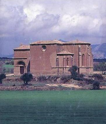 Iglesia de San Miguel de Foces situada en Ibieca (Huesca)